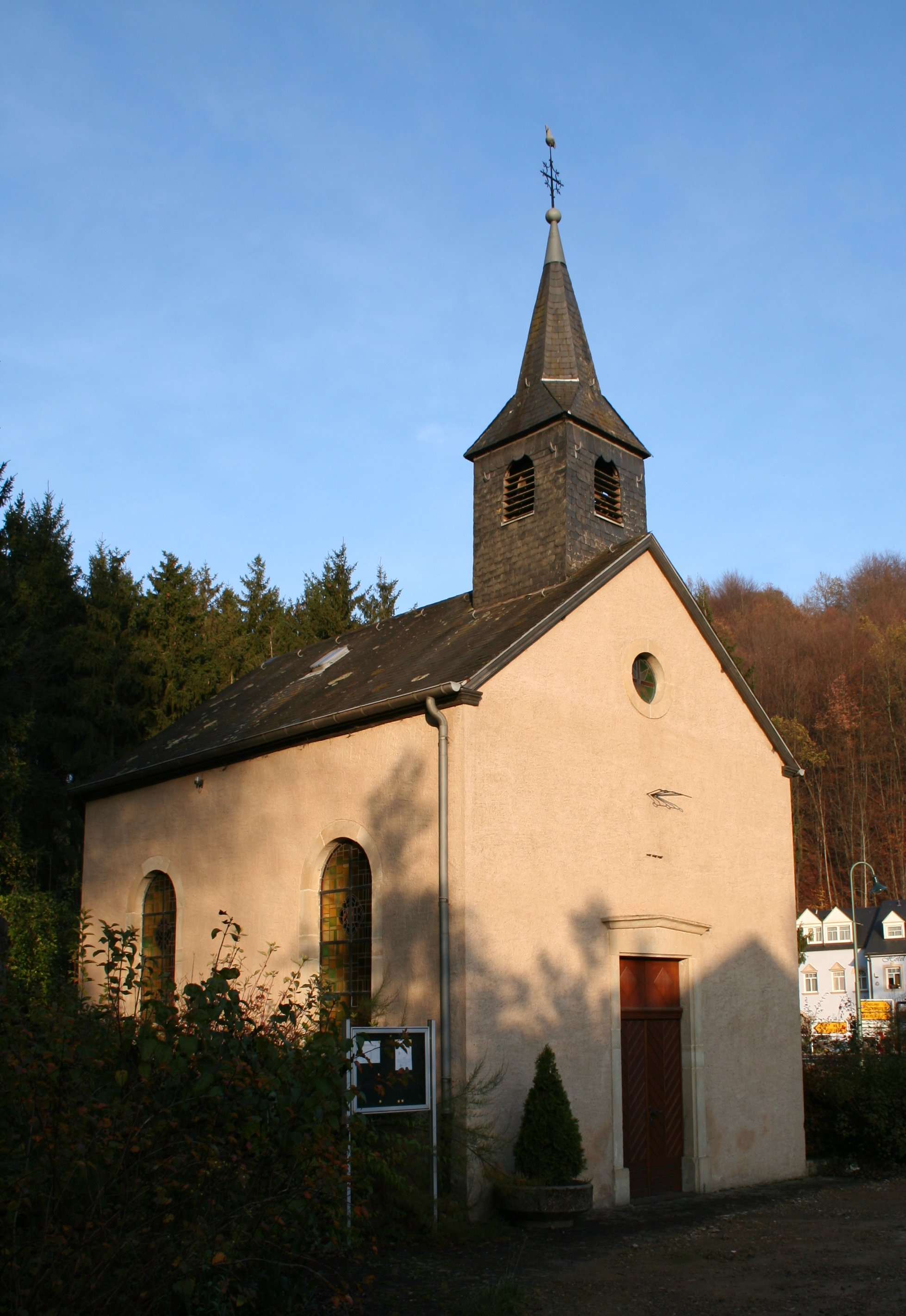 Sujet: Kapell vu Bur Auteur: Marcus Lizens: GFDL